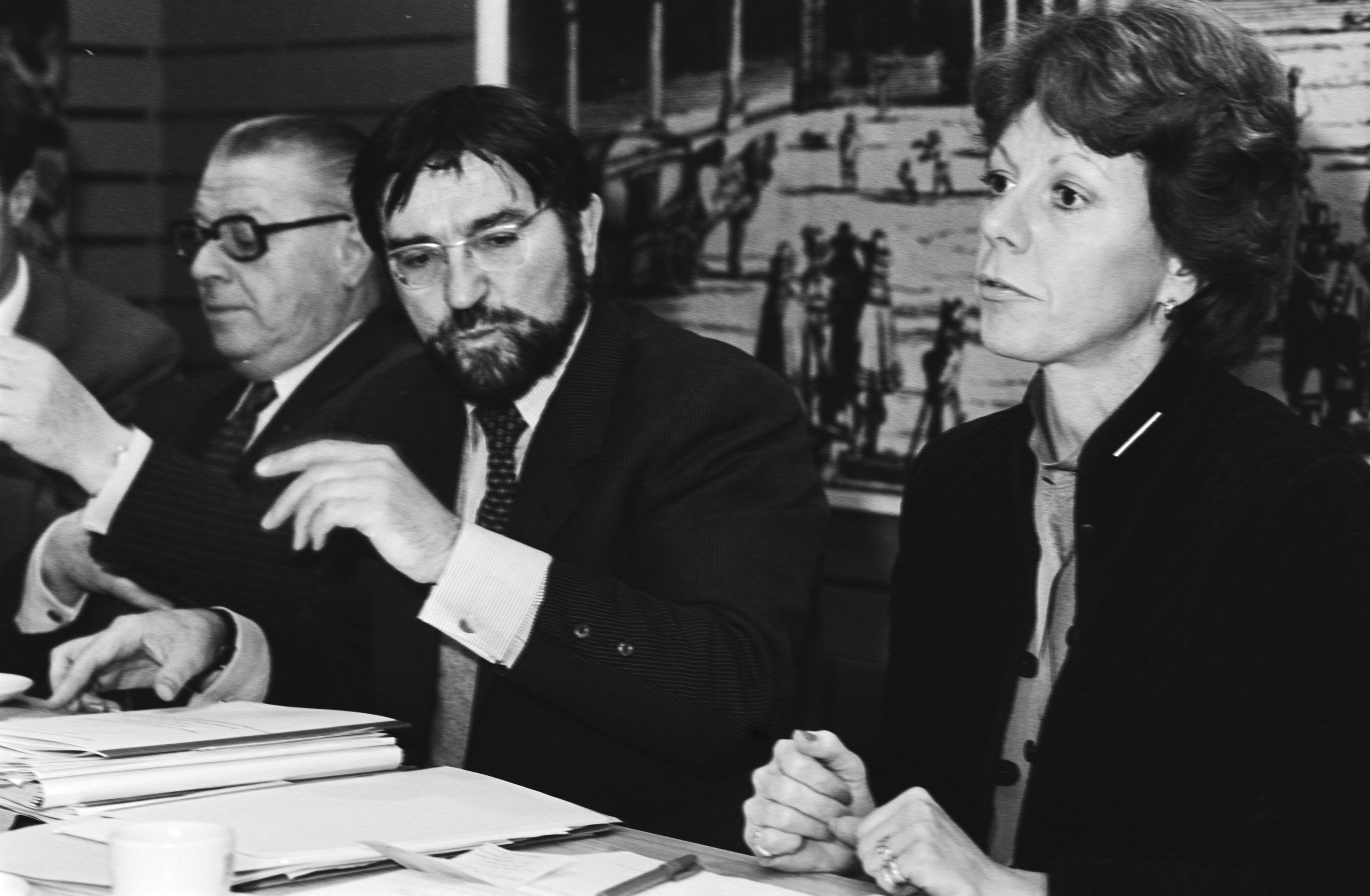 Collectie / Archief : Fotocollectie Anefo Reportage / Serie : [ onbekend ] Beschrijving : Persconferentie van het Ministerie van Verkeer en Waterstaat i.v.m. het Benelux-zeehavenoverleg in Den Haag; v.l.n.r. Olivier (Openbare Werken, België), De Croo (Verkeerswezen en PTT, België) , en Smit-Kroes (Verkeer en Waterstaat) Datum : 30 november 1982 Locatie : Den Haag, Zuid-Holland Trefwoorden : ministers, persconferenties Persoonsnaam : De Croo, Herman, Olivier, Louis, Smit-Kroes, Neelie Fotograaf : Antonisse, Marcel / Anefo Auteursrechthebbende : Nationaal Archief Materiaalsoort : Negatief (zwart/wit) Nummer archiefinventaris : bekijk toegang 2.24.01.05 Bestanddeelnummer : 932-4225